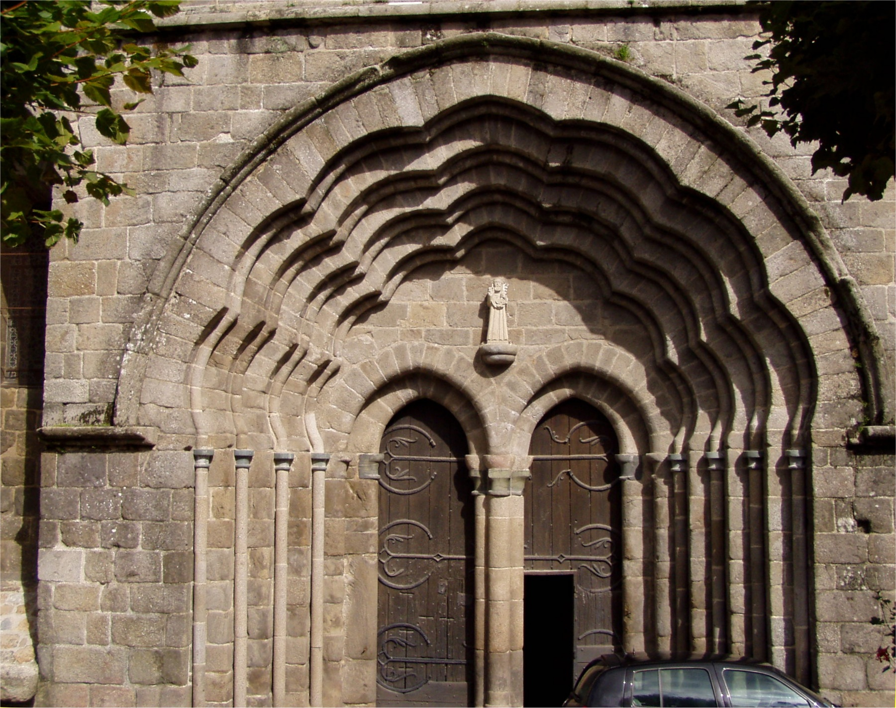 Le portail de la collégiale Saint-Pierre , Le Dorat (Haute-Vienne) Photo personnelle de Françoise Thurion alias Accrochoc prise avec un appareil photo numérique de marque Olympus C725 en septembre fr:2004.